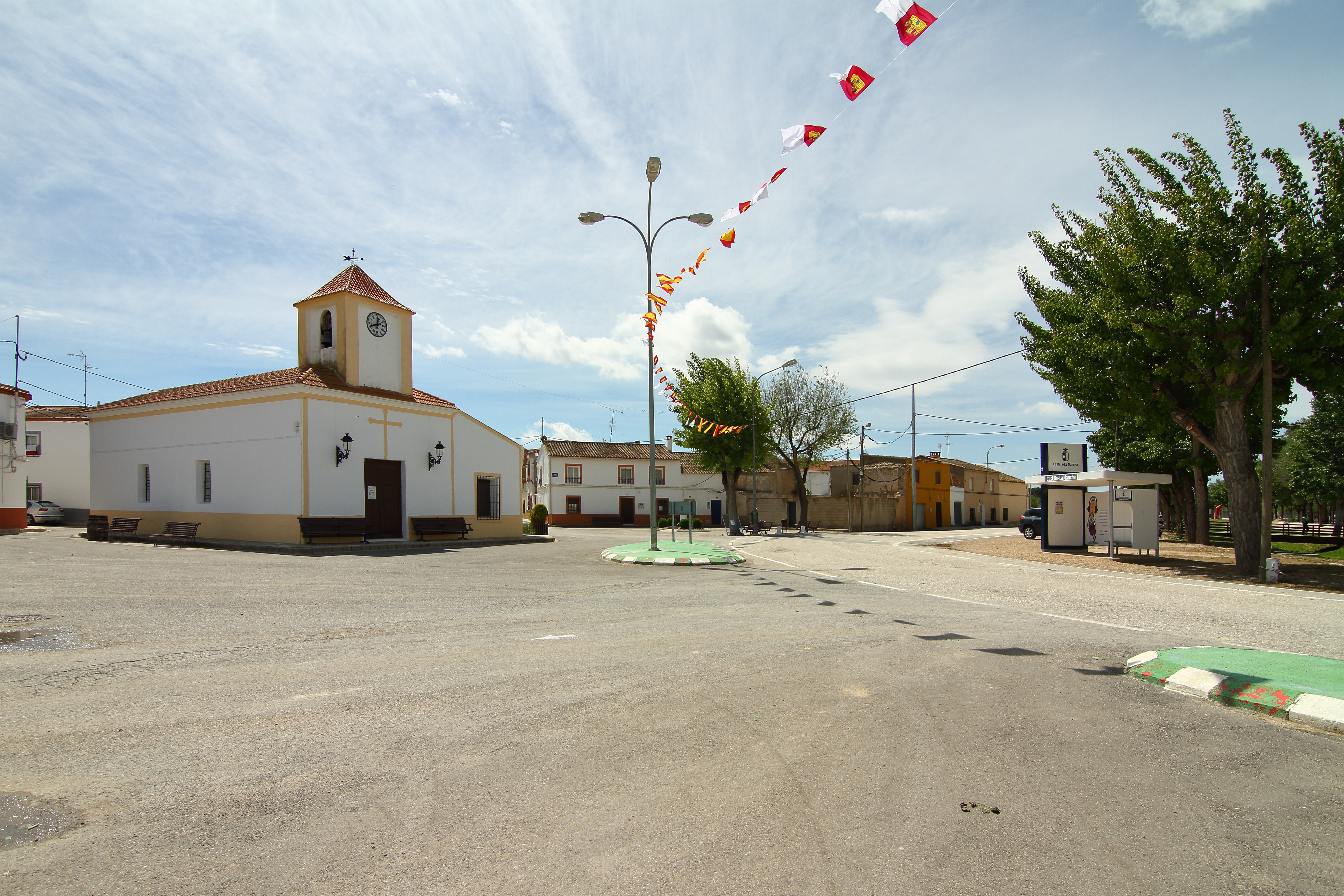 Tinajeros, Plaza de la Constitución, Iglesia